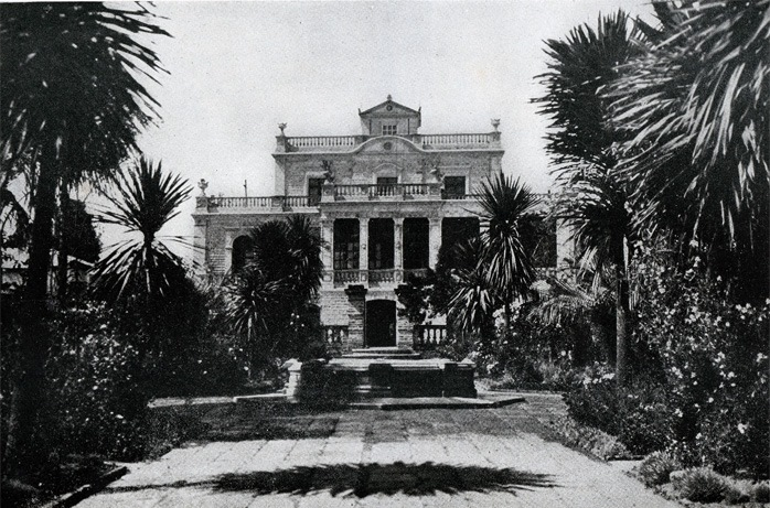 Quinta presidencial del presidente de la República del Ecuador. Fue usada en la ´decada de 1940 y estaba ubicada en el sector de La Mariscal, no existe más.